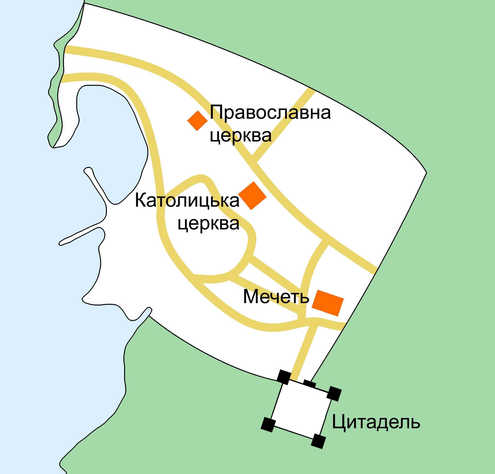 Карта города Библа в средневековье